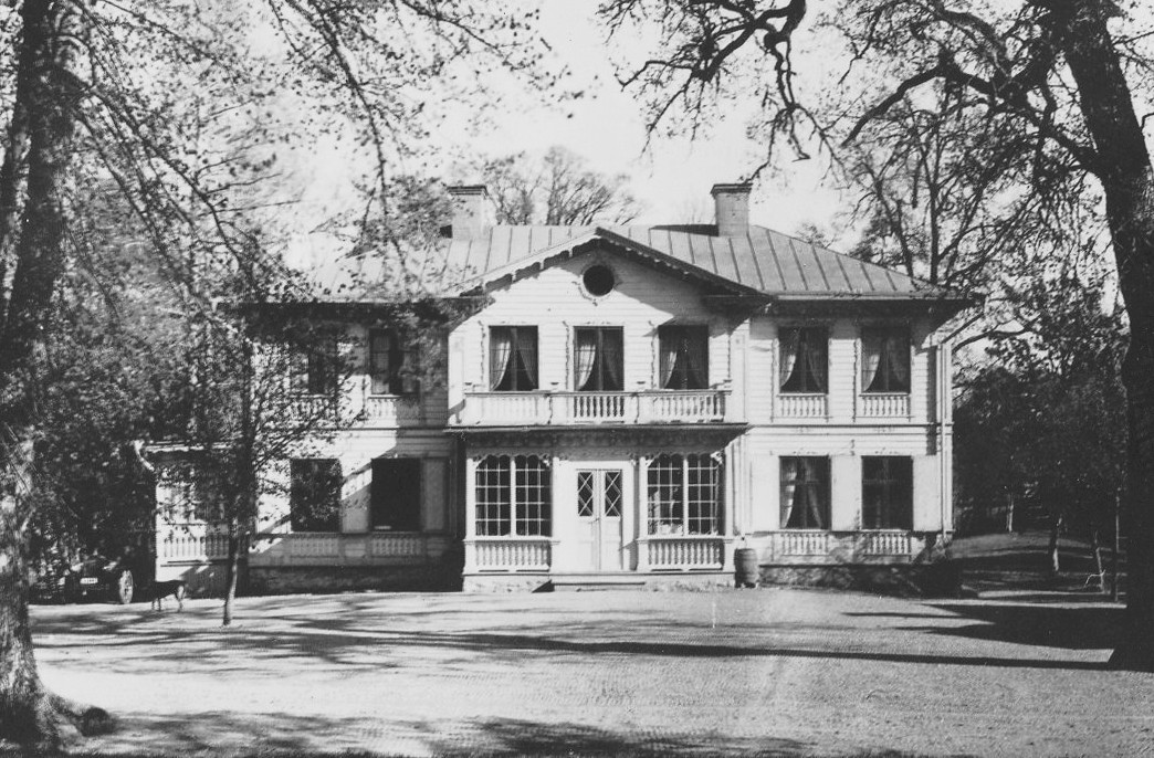 Mangården på Ekudden vid Flaten (riven)